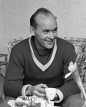 Veikko Hakulinen